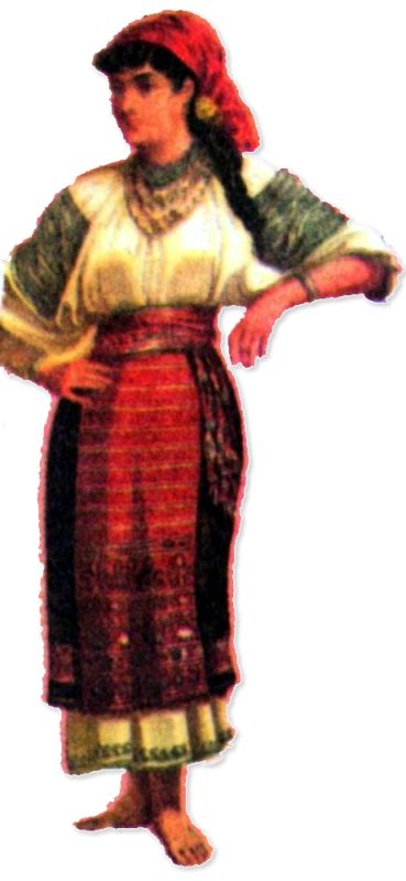 Romanians